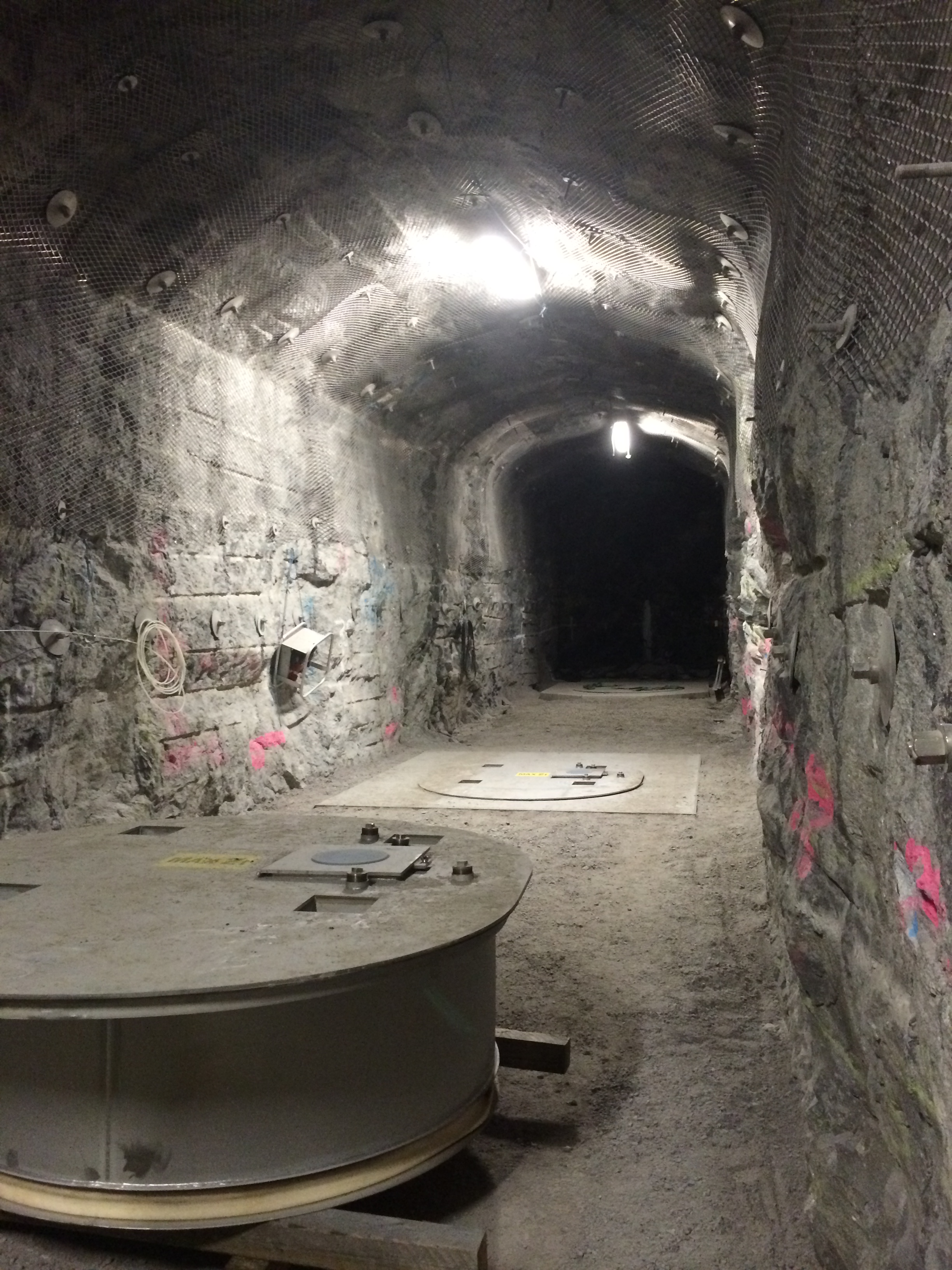 Kuva onkalo